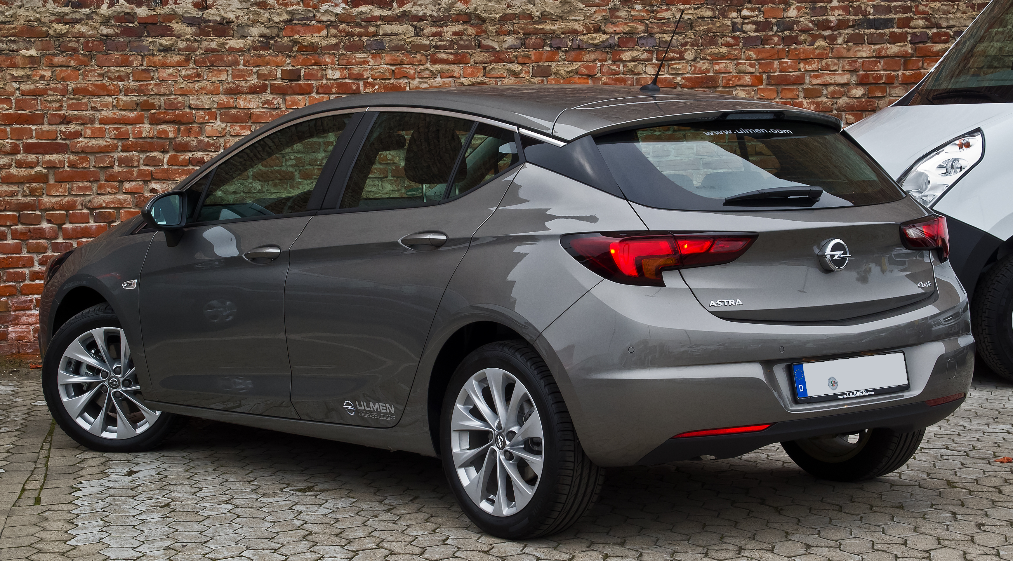 Opel Astra 1.6 CDTI ecoFLEX Edition (K)